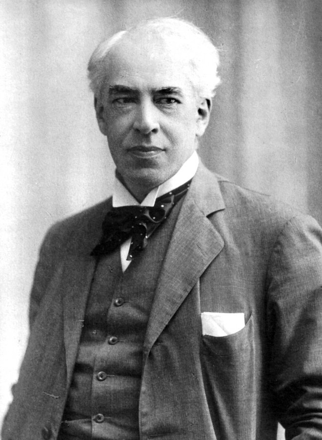 Constantin Stanislavski